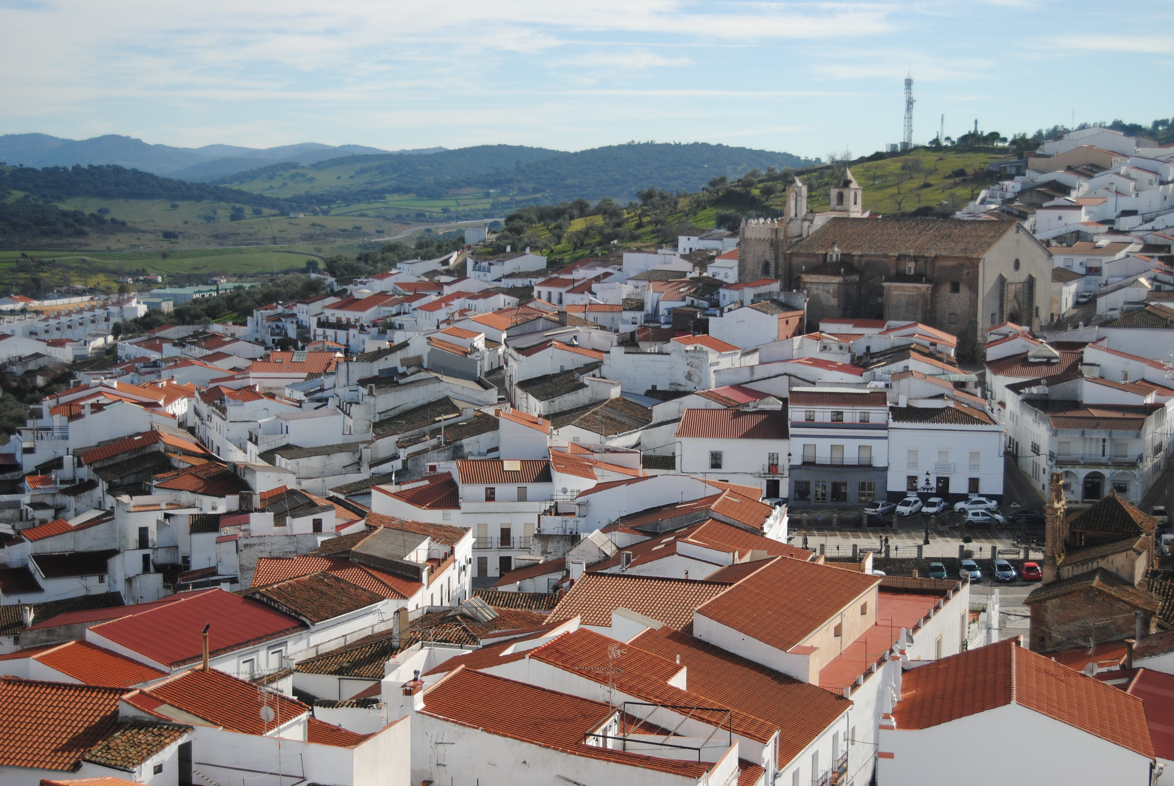 Segura de León, provincia de Badajoz, Extremadura, España.